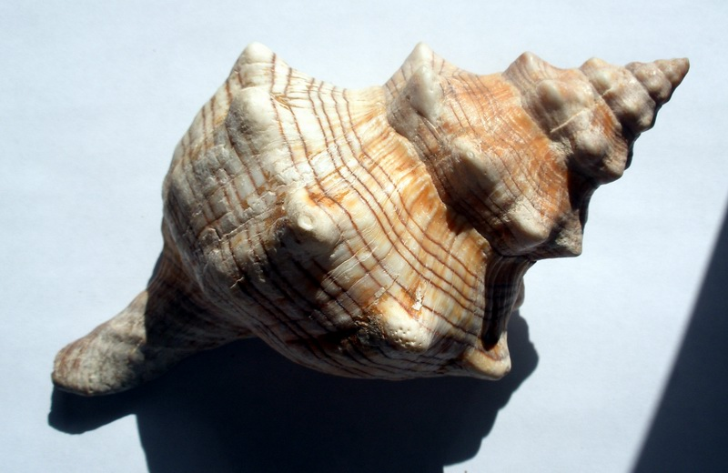 Pleuroploca trapezium (synonym : Fasciolaria trapezium)